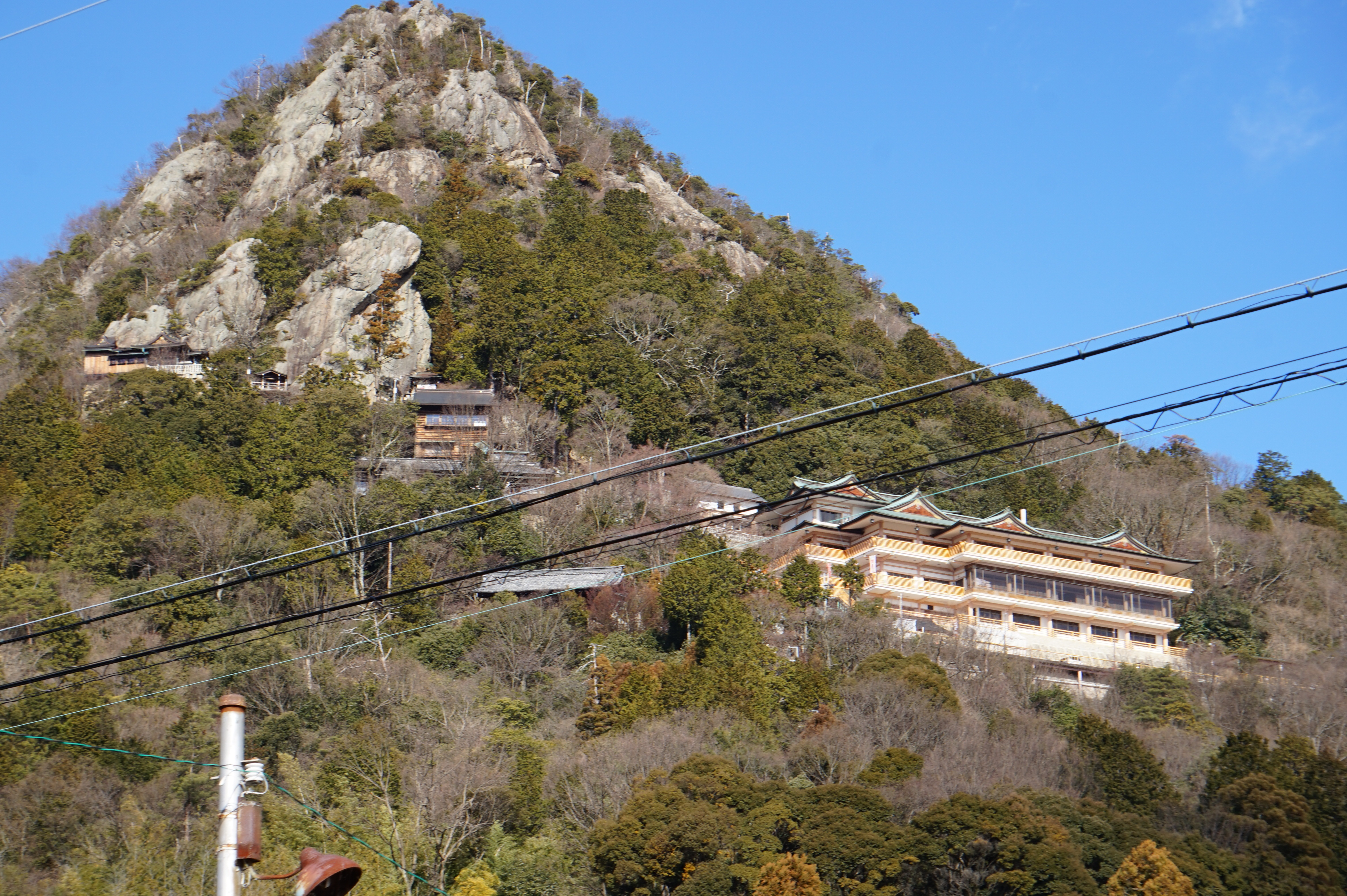 赤神山 下から写真